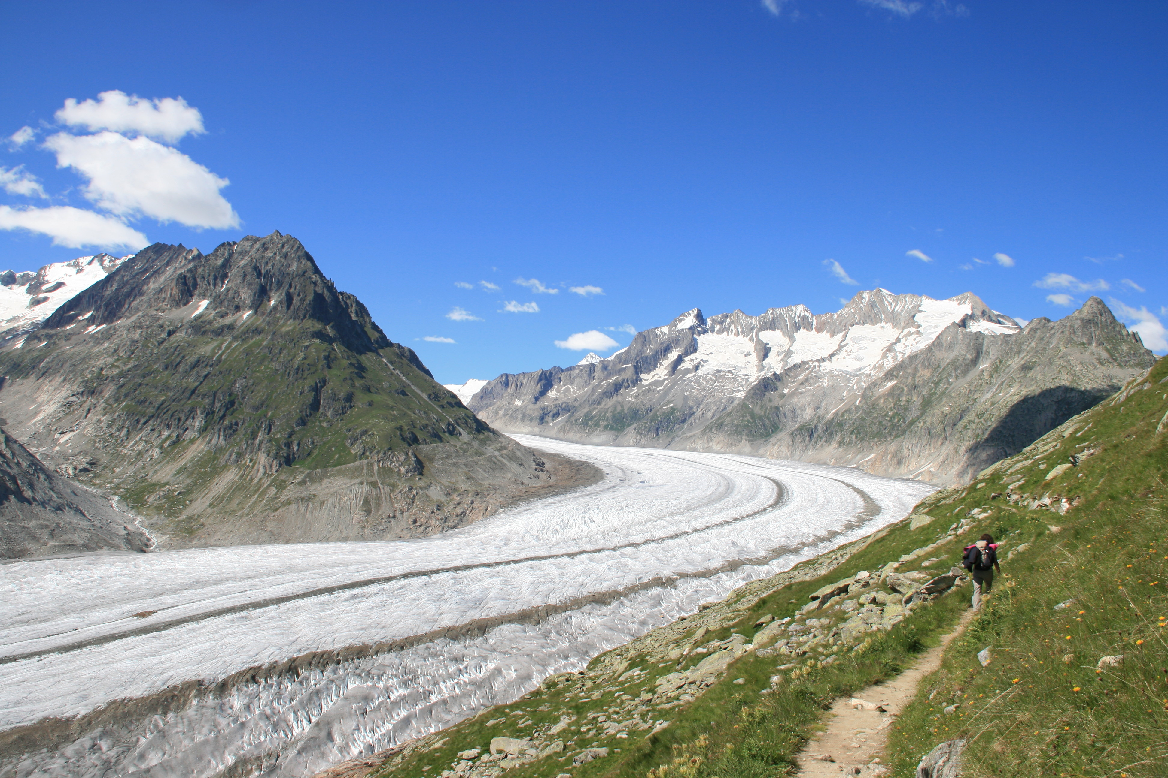 Aletsch-Gletscher (UNESCO-Weltnaturerbe) im Schweizer Kanton Wallis. Fotografiert am 23. Juli 2012.